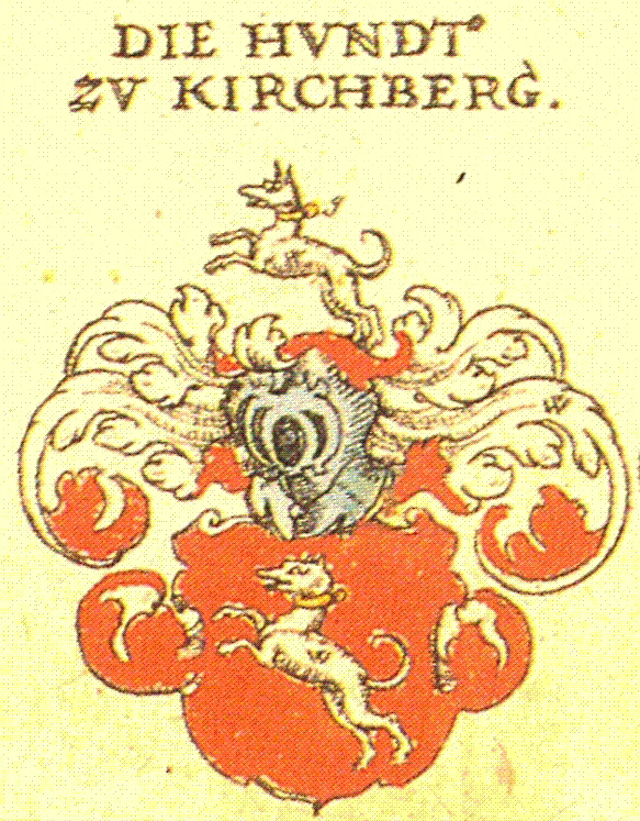 Wappen der Familie von Hundt aus Siebmachers Wappenbuch